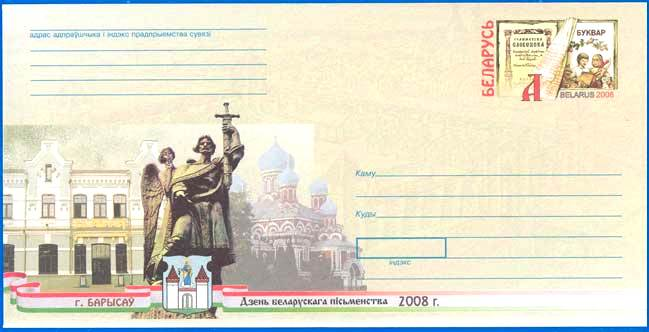 Конверт №82 с оригинальной маркой Республики Беларусь, выпущен 7 сентября 2008 года. Художник Микола Рыжий. Иллюстрация: г. Борисов. День белорусской письменности. 2008 г. (на бел. яз.). Памятник основателю города князю Борису на фоне вокзала и Борисовского Воскресенского Собора, герб города. Марка: Стилизованный букварь. Тираж 47 000 экз